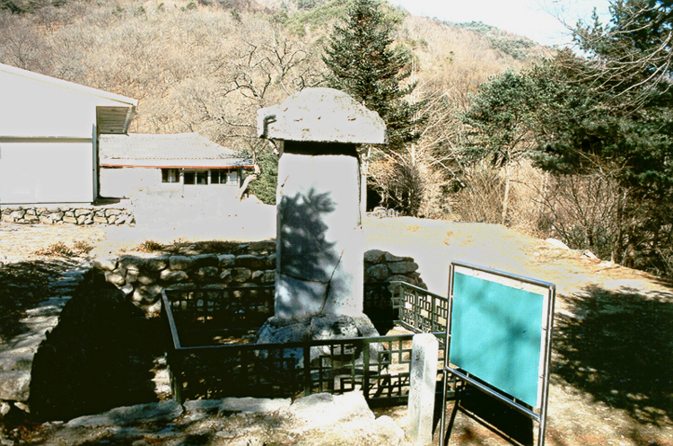 경상북도 유형문화재 제4호 비로사진공대사보법탑비 (毘盧寺眞空大師普法塔碑) - 전경